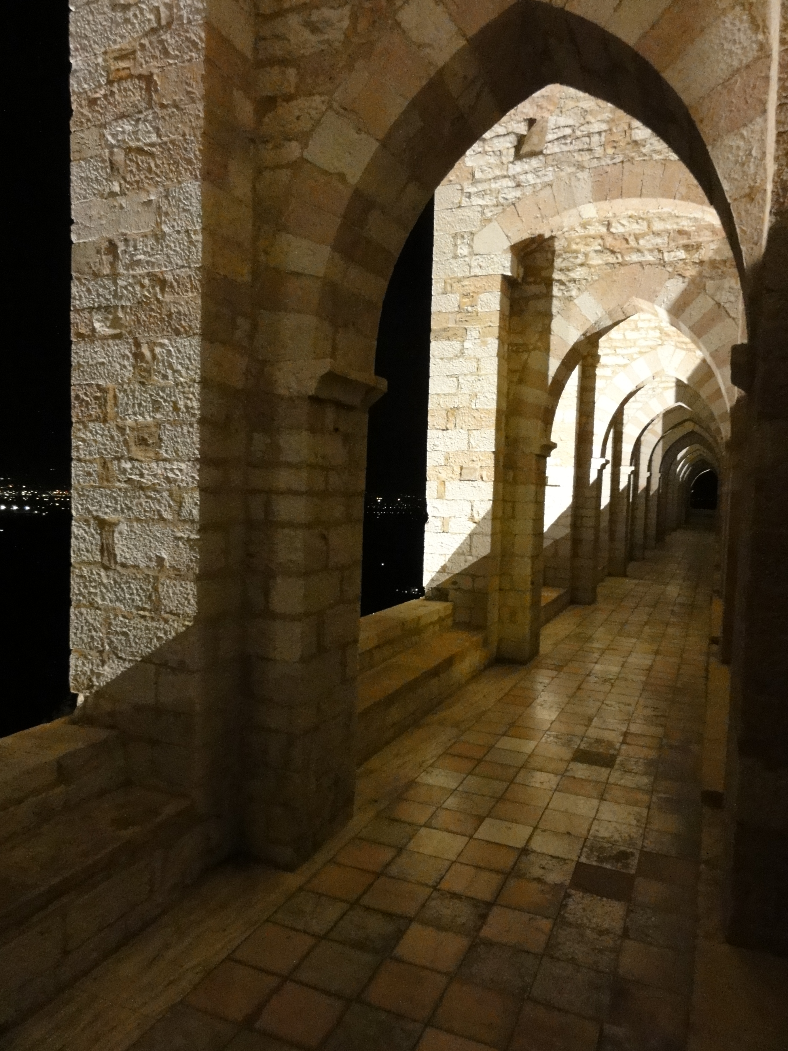 Assisi, Sacro Convento, veduta notturna del porticato trecentesco ("calzo") esterno del refettorio "grande"